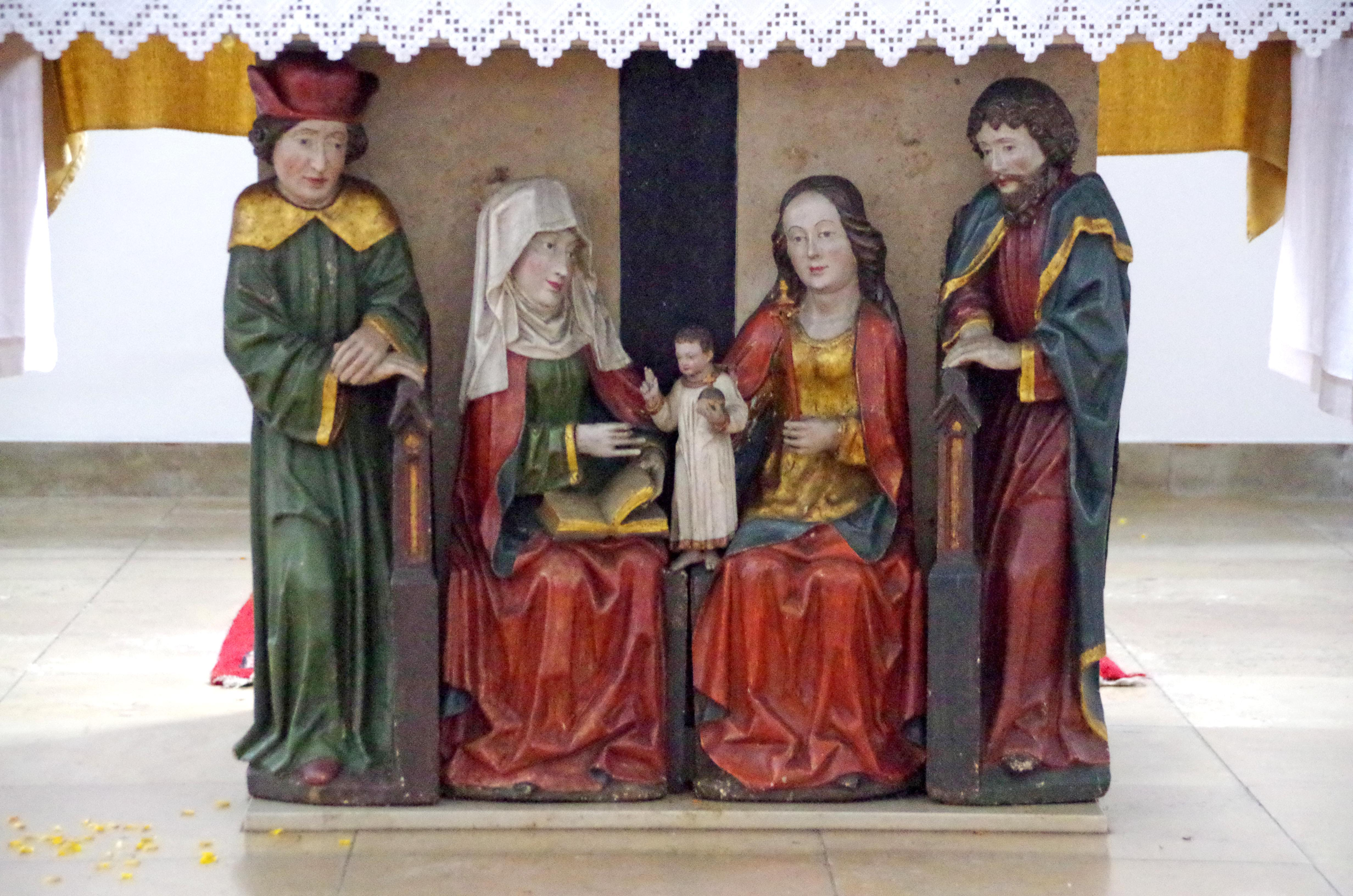 St. Bernhard (Hollerath), Heilige Sippe (15. Jh.) vor dem Altar